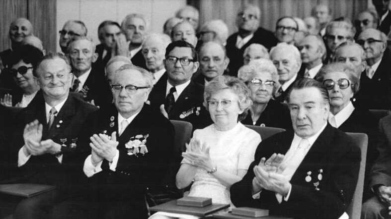 Berlin, Verleihung Karl-Marx-Orden ADN-ZB Koard 28.5.1975 Berlin: Auszeichnung verdienstvoller Kollektive und Persönlichkeiten Der Vorsitzende des Staatsrates der DDR, Willi Stoph, Mitglied des Politbüros des ZK der SED, verlieh am 28.5.1975 hohe staatliche Auszeichnungen an Kollektive und Persönlichkeiten in Anerkennung hervorragender Leistungen in der Arbeiterbewegung und bei der Entwicklung der DDR. Mit dem Karl-Marx-Orden wurden geehrt der Arbeiterveteran Walter Hähnel, der Schriftsteller Werner Eggerath und Prof. Karl von Appen, Ordentliches Mitglied der Akademie der Künste der DDR und Ausstattungsleiter am Berliner Ensemble (von links) . Abgebildete Personen: Appen, Karl von Prof.: Chefbühnenbildner des Berliner Ensembles, Akademie der Künste (AdK)), DDR (GND 118649884) Eggerath, Werner: Staatssekretär für Kirchenfragen, DDR (GND 118529064)